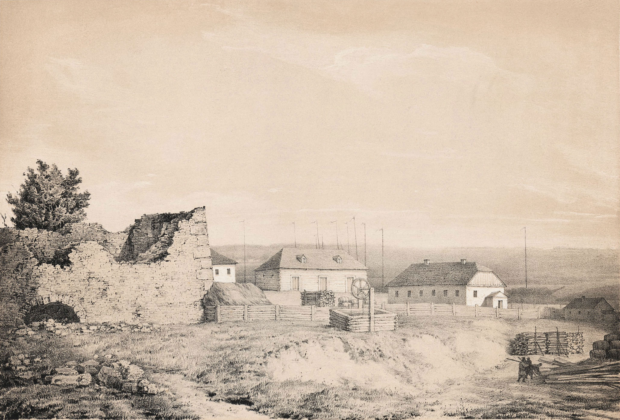 Беларуская (тарашкевіца): Пінск (Pinsk), прадмесьце Каралін (Karalin). Руіны замка князёў Вішнявецкіх